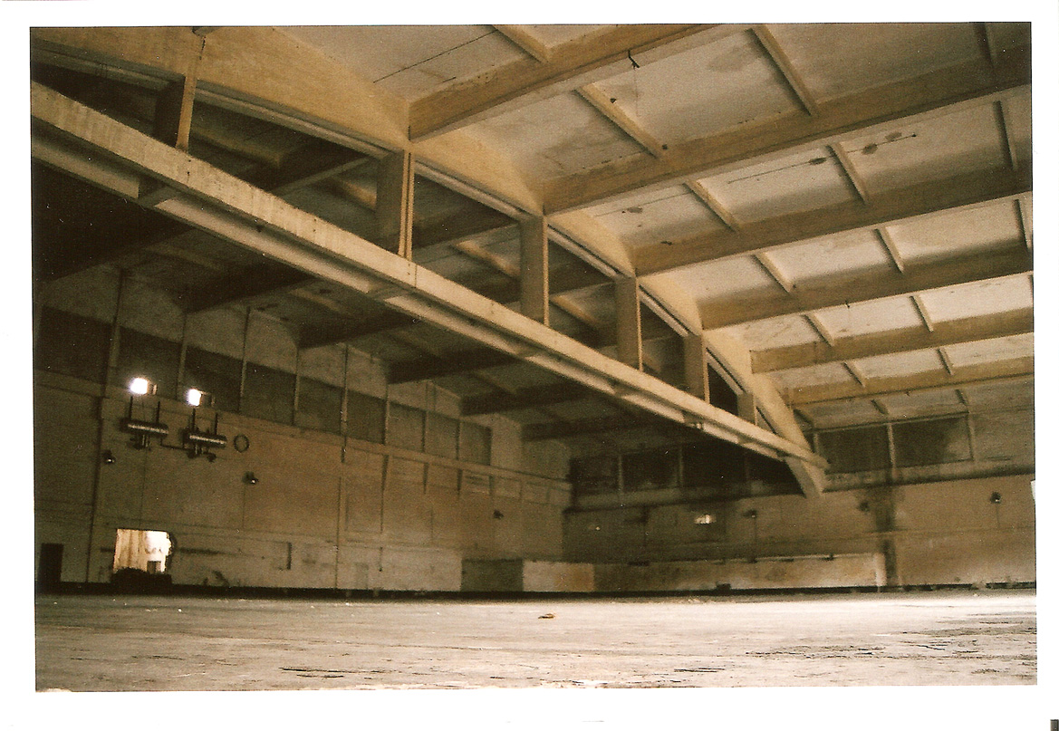 Innenansicht einer Halle ("Seehalle") der ehemaligen Seefliegerstation auf dem Fliegerhorst Pütnitz (heute Flugplatz Damgarten)